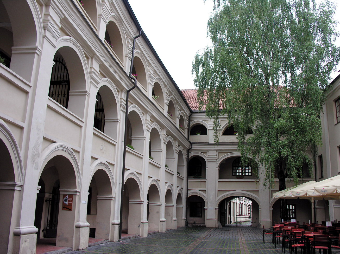 Vilnius: Alumnatas Foto: Algirdas, 2006 m. rugpjūčio 10 d., Lietuva